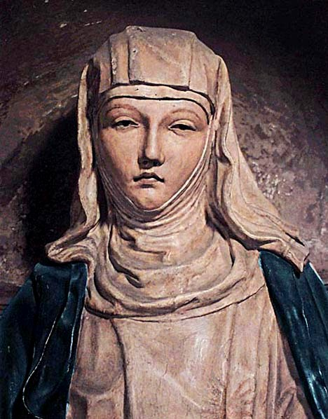 Св_Екатерина_сиенская_Ораторио_Санта_Катерина_Neroccio